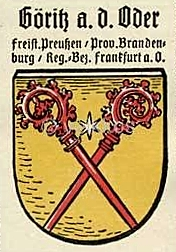 Przedwojenny herb Górzycy.